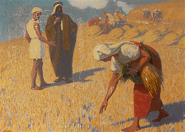 Alttestamentarische Szene - Weizenernte mit Ährenleserin Ruth